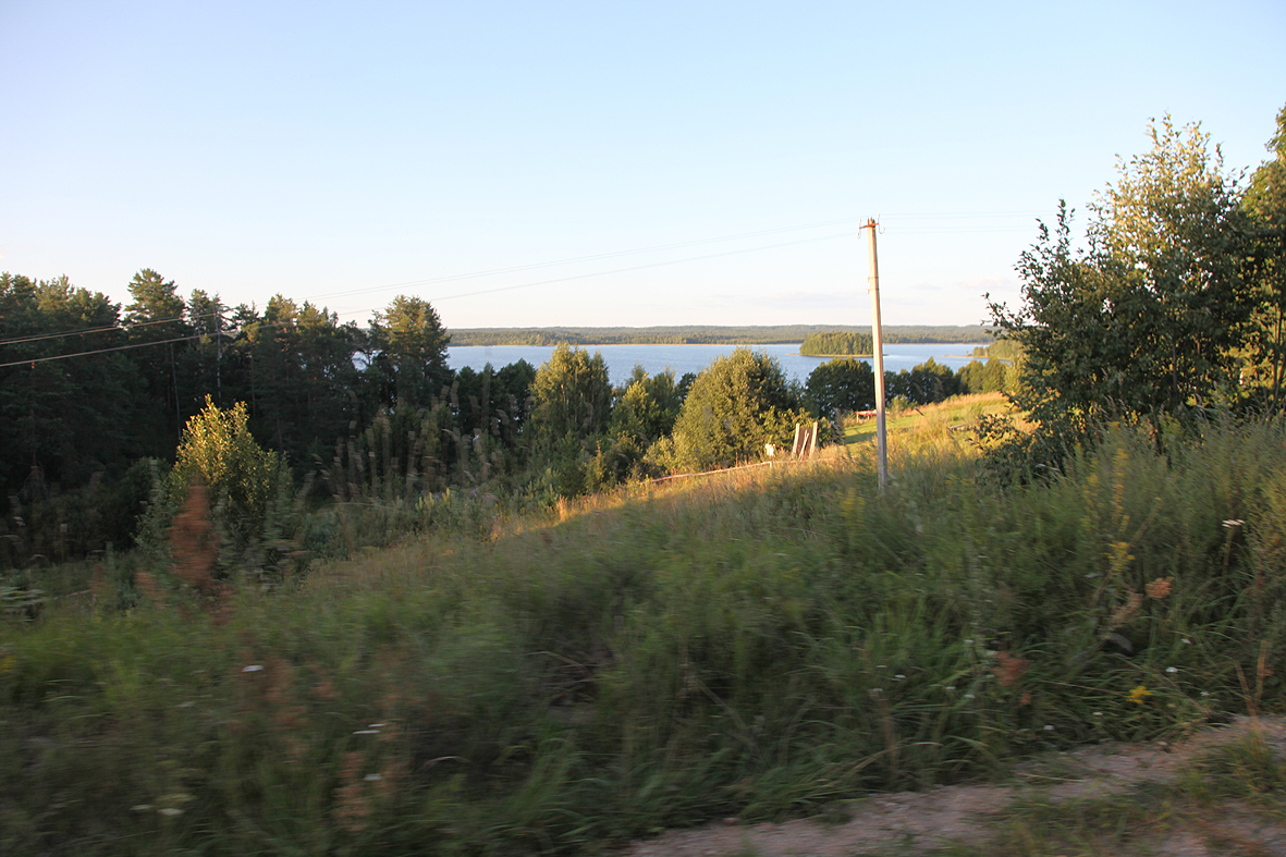 фото из похода